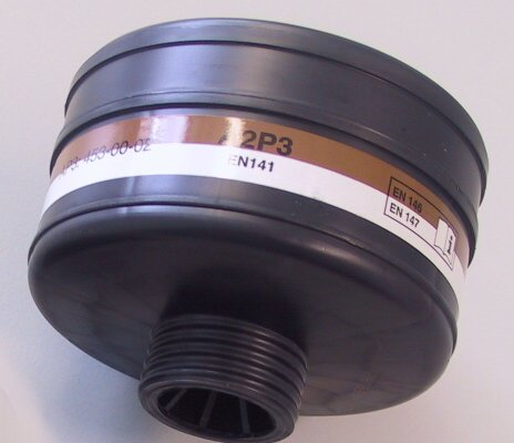 Muster eines Atemluft-Kombinationsfilters